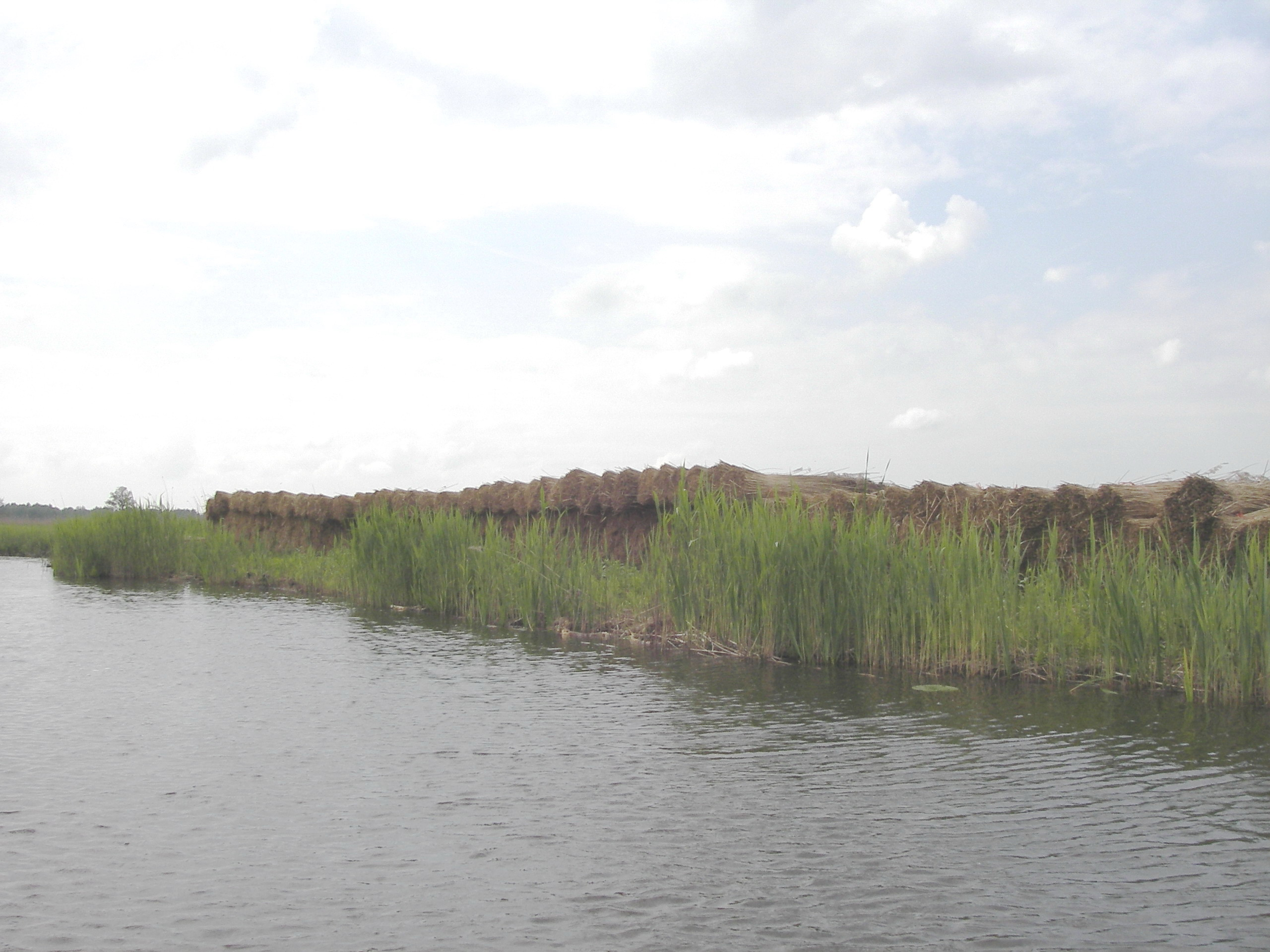 Veldbossen met dekriet in de Nieuwkoopse plassen.